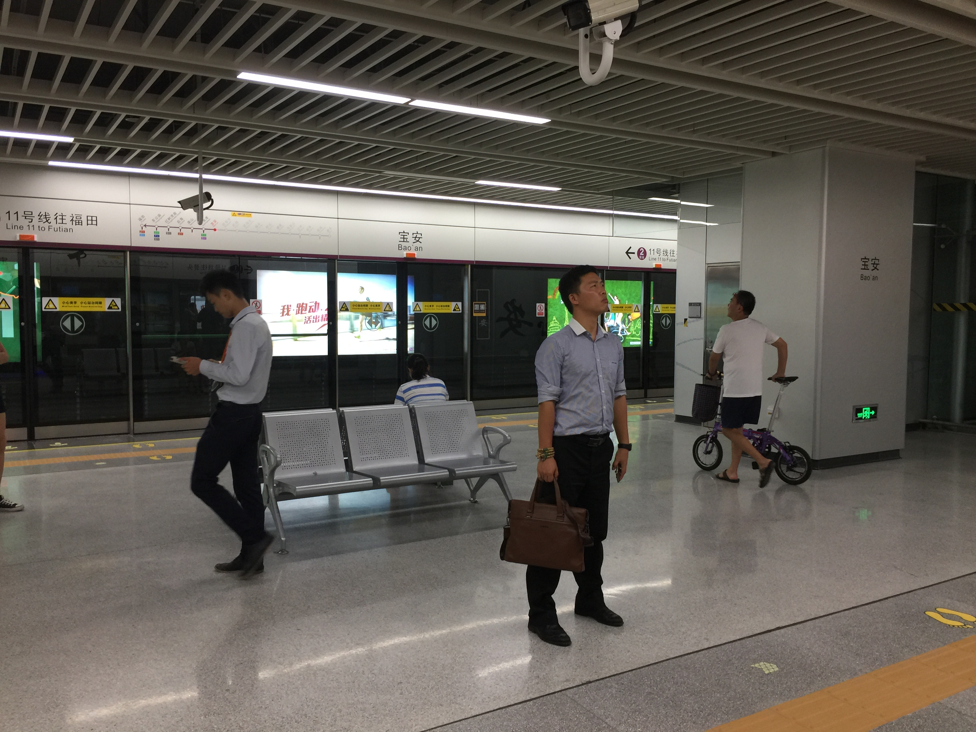 Shenzhen Metro Line 11